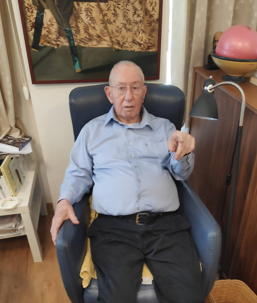 האלוף אלעד פלד, 2019